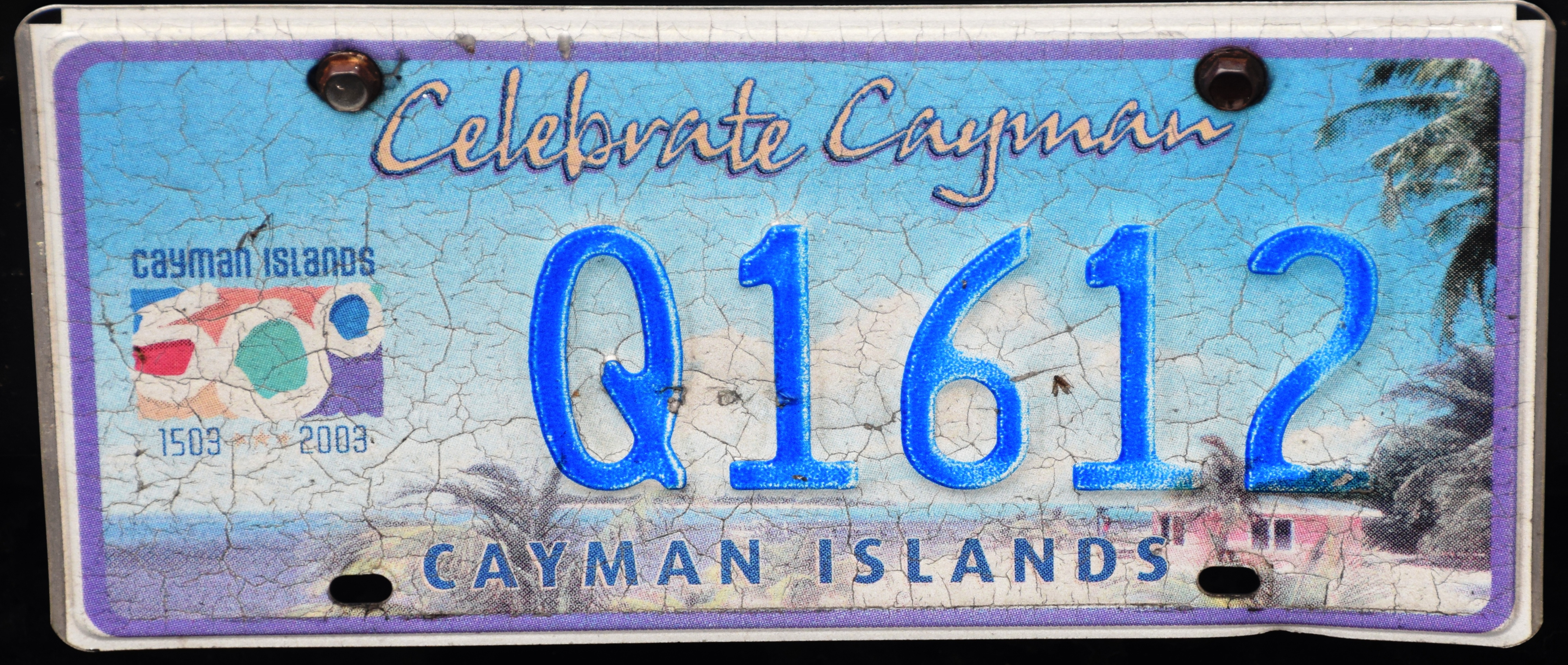 kenteken plaat van de Cayman Islands